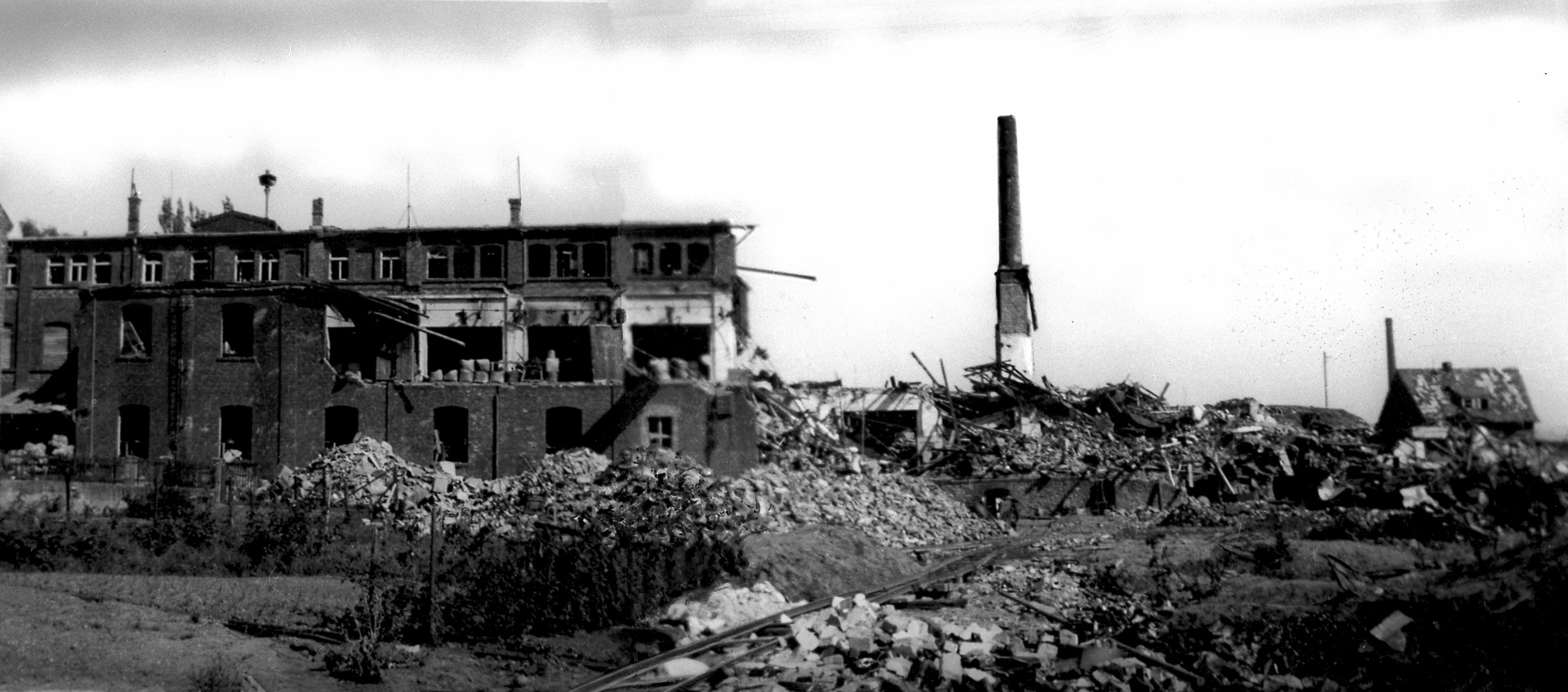 Beim Bombenangriff 1945 wird die Blechwarenfabrik Limburg fast gänzlich zerstört.